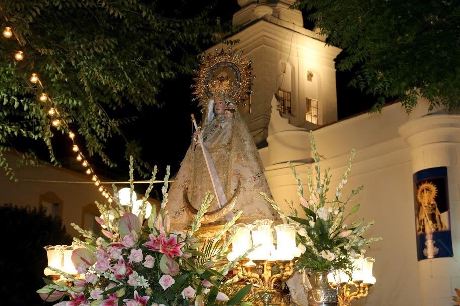 Velá Virgen de la Coronada-Ayuntamiento de Villafranca de los Barros